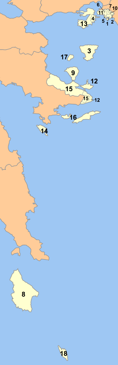 Map of Pireas nomarchia (Greece) with administrative divisions (municipalities and communities) numbered in alphabetical order (in greek). Legend: 1. Δήμος Πειραιώς - Pireas 2. Δήμος Αγίου Ιωάννου Ρέντη - Agios Ioannis Rendis 3. Δήμος Αίγινας - Egina 4. Δήμος Αμπελακίων - Ambelakia 5. Δήμος Δραπετσώνας - Drapetsona 6. Δήμος Κερατσινίου - Keratsini 7. Δήμος Κορυδαλλού - Korydallos 8. Δήμος Κυθήρων - Kythira 9. Δήμος Μεθάνων - Methana 10. Δήμος Νίκαιας - Nikea 11. Δήμος Περάματος - Perama 12. Δήμος Πόρου - Poros 13. Δήμος Σαλαμίνος - Salamis 14. Δήμος Σπετσών - Spetses 15. Δήμος Τροιζήνας - Trizina 16. Δήμος Ύδρας - Ydra 17. Κοινότητα Αγκιστρίου - Angistri 18. Κοινότητα Αντικυθήρων - Andikythira